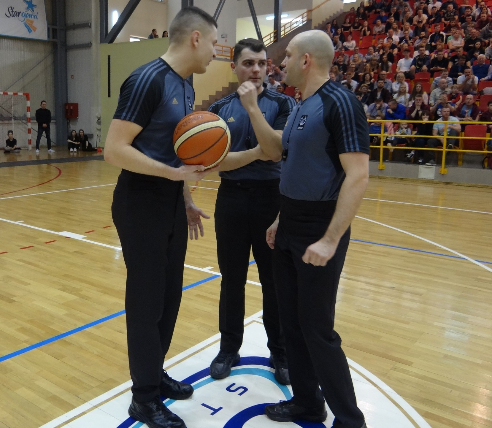 Sędziowie meczu Spójnia- Jamalex